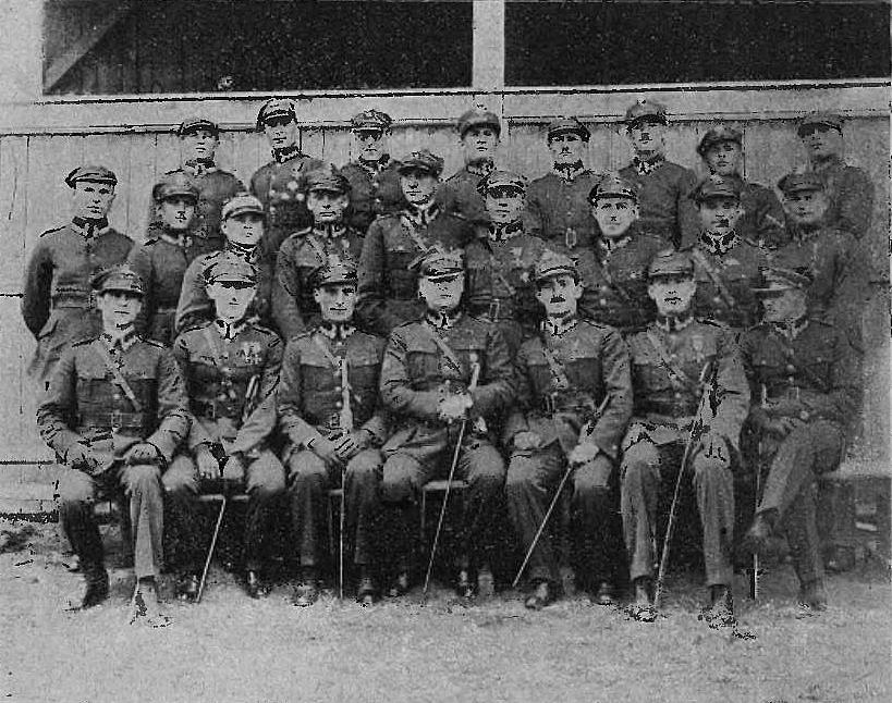 Kadra Centralnej Wojskowej Szkoły Gimnastyki i Sportów w Poznaniu przed 1929.